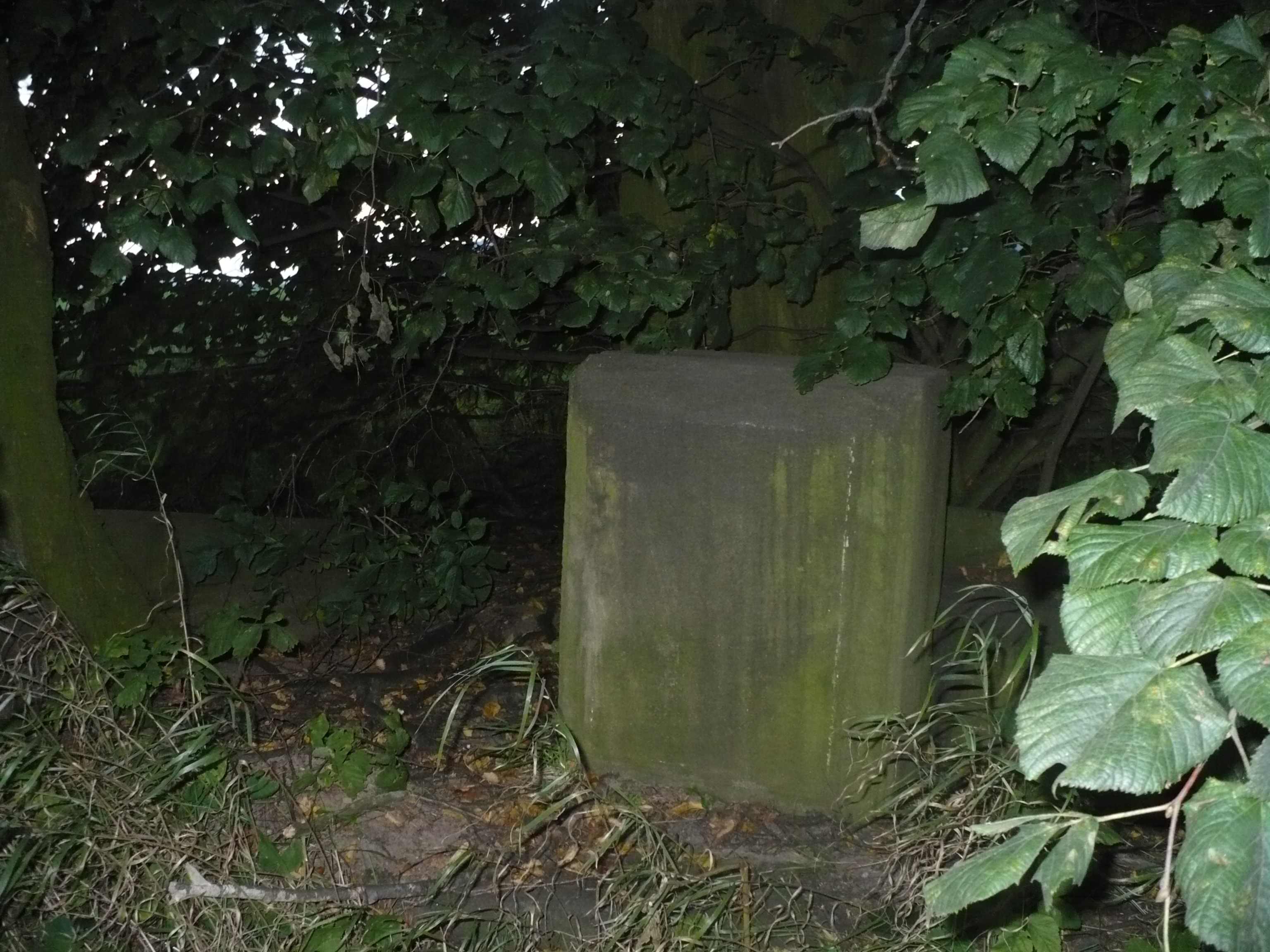 Pozůstatek kříže u Ostrova (okres Ústí nad Orlicí).Loc: 49°55'9.902"N, 16°33'2.647"E (